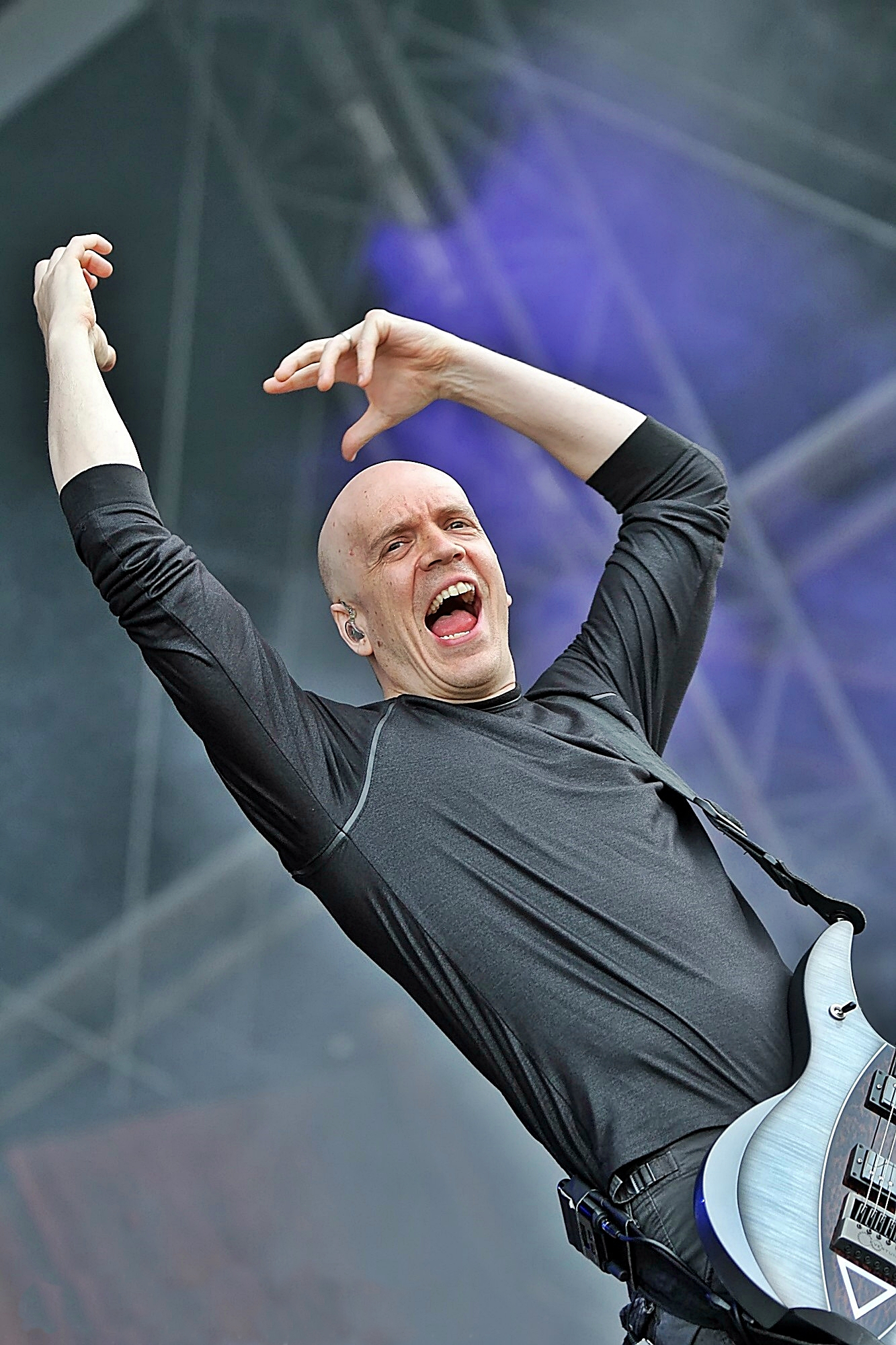 Devin Townsend auf dem Summer Breeze Open Air 2017 in Dinkelsbühl